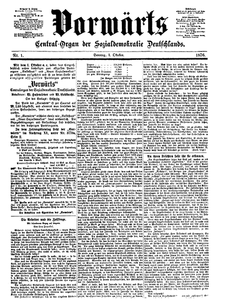 Beschreibung: Titelseite des Vorwärts vom 1. Oktober 1876 (Erstausgabe) Lizenz: Public Domain (Urheberrechte abgelaufen)